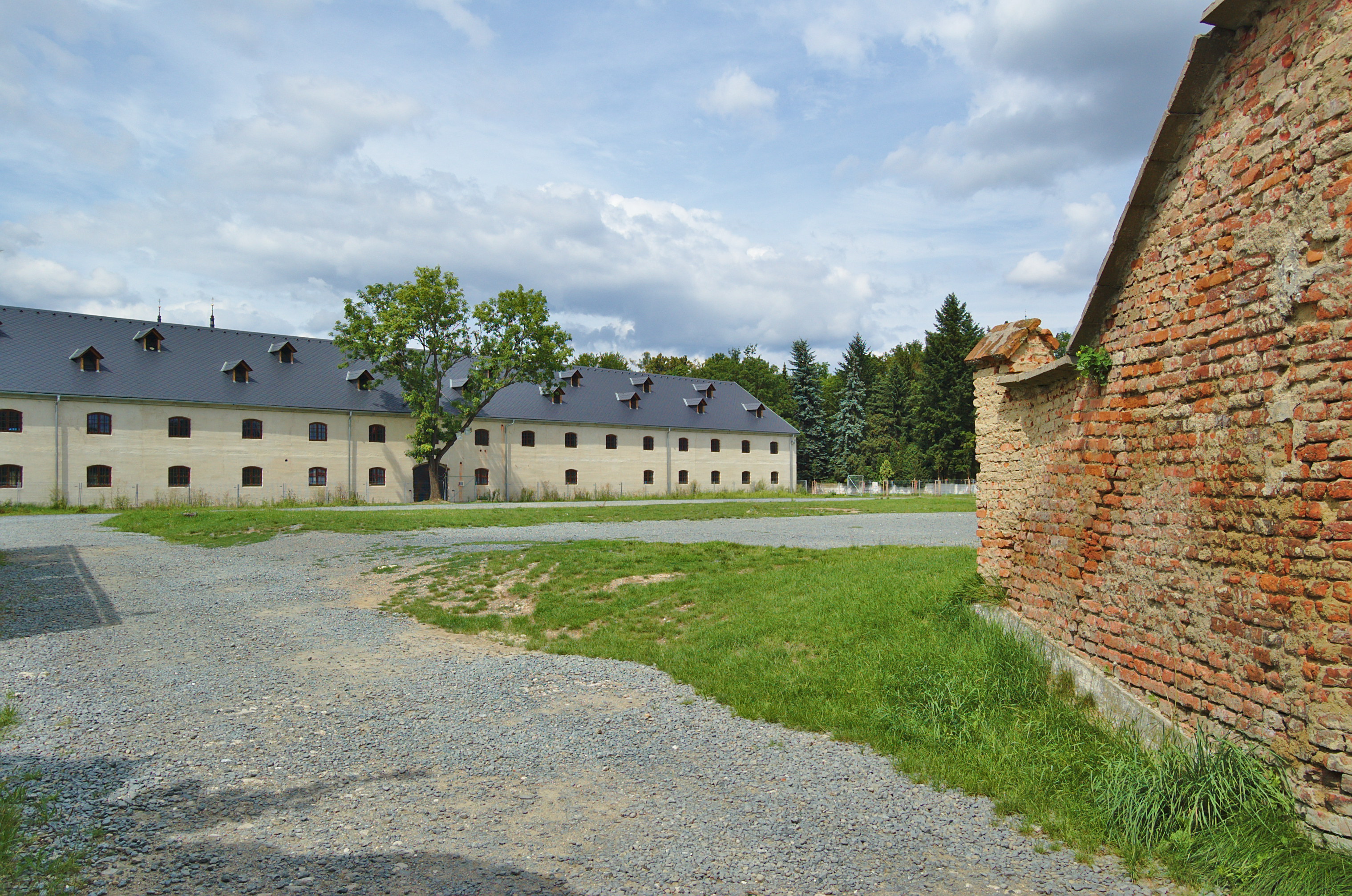 Pevnost, Olomouc